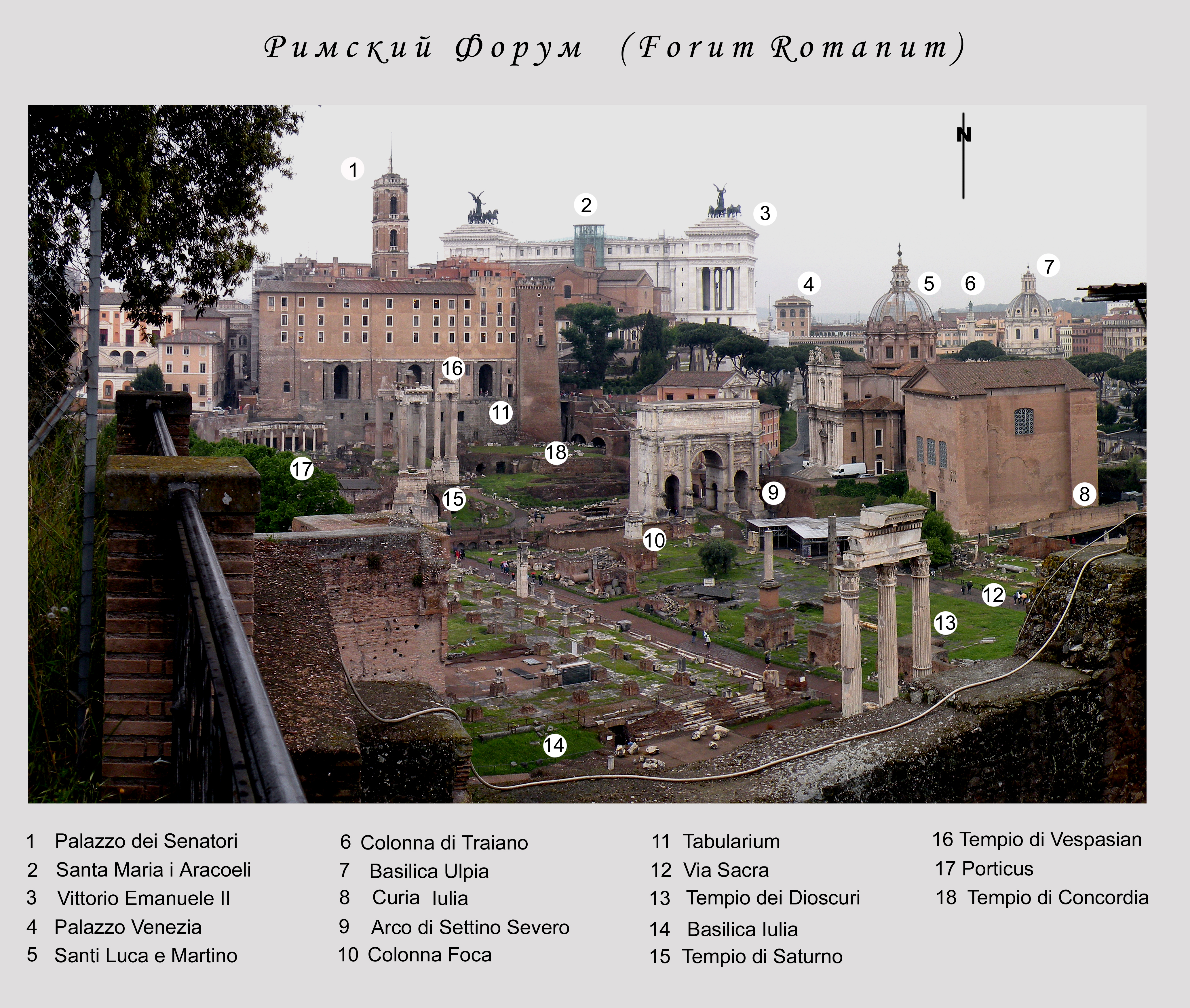 Римский Форум.